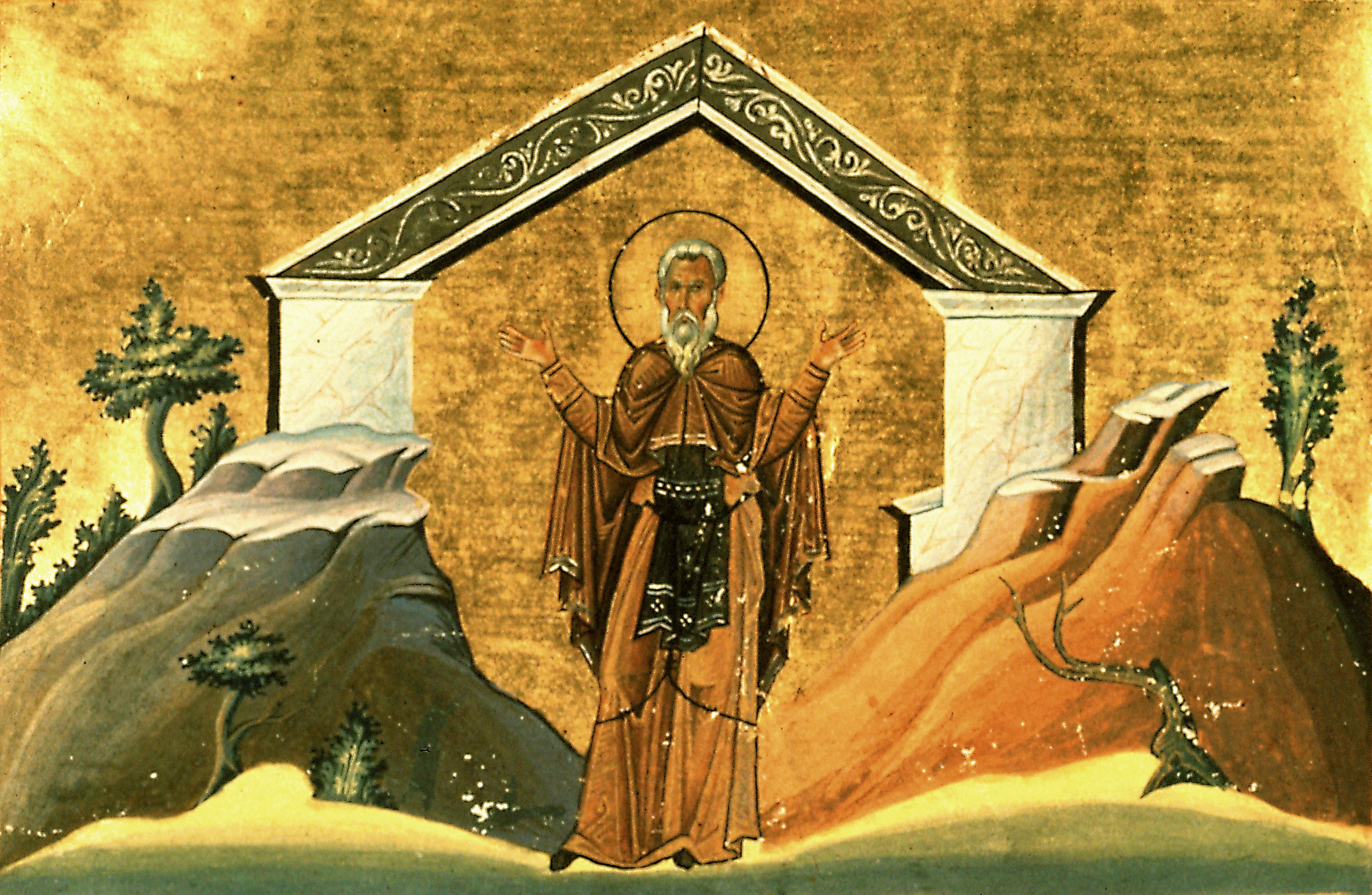 Прп. Авксентий Константинополь. 985 г. Миниатюра Минология Василия II. Ватиканская библиотека. Рим.